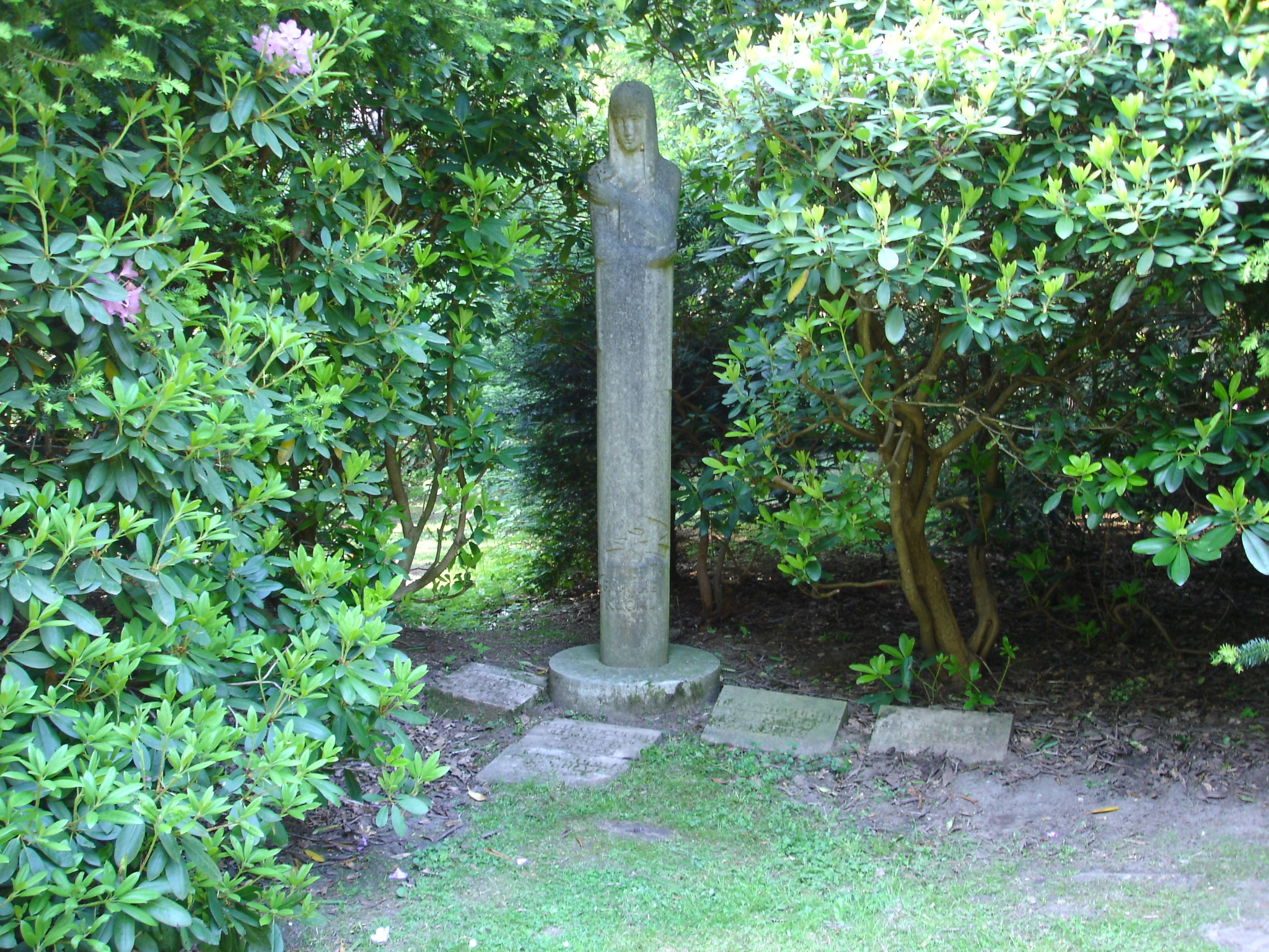 Muschelkalk-Familiengrabstein Kuöhl von 1931 des deutschen Bildhauers Richard Kuöhl auf dem Hamburger Friedhof Ohlsdorf.